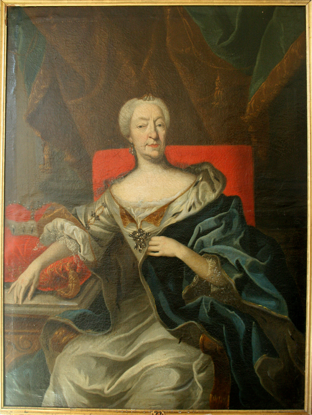 Porträt Magdalena Wilhelmine, ehemals Schloss Mainau